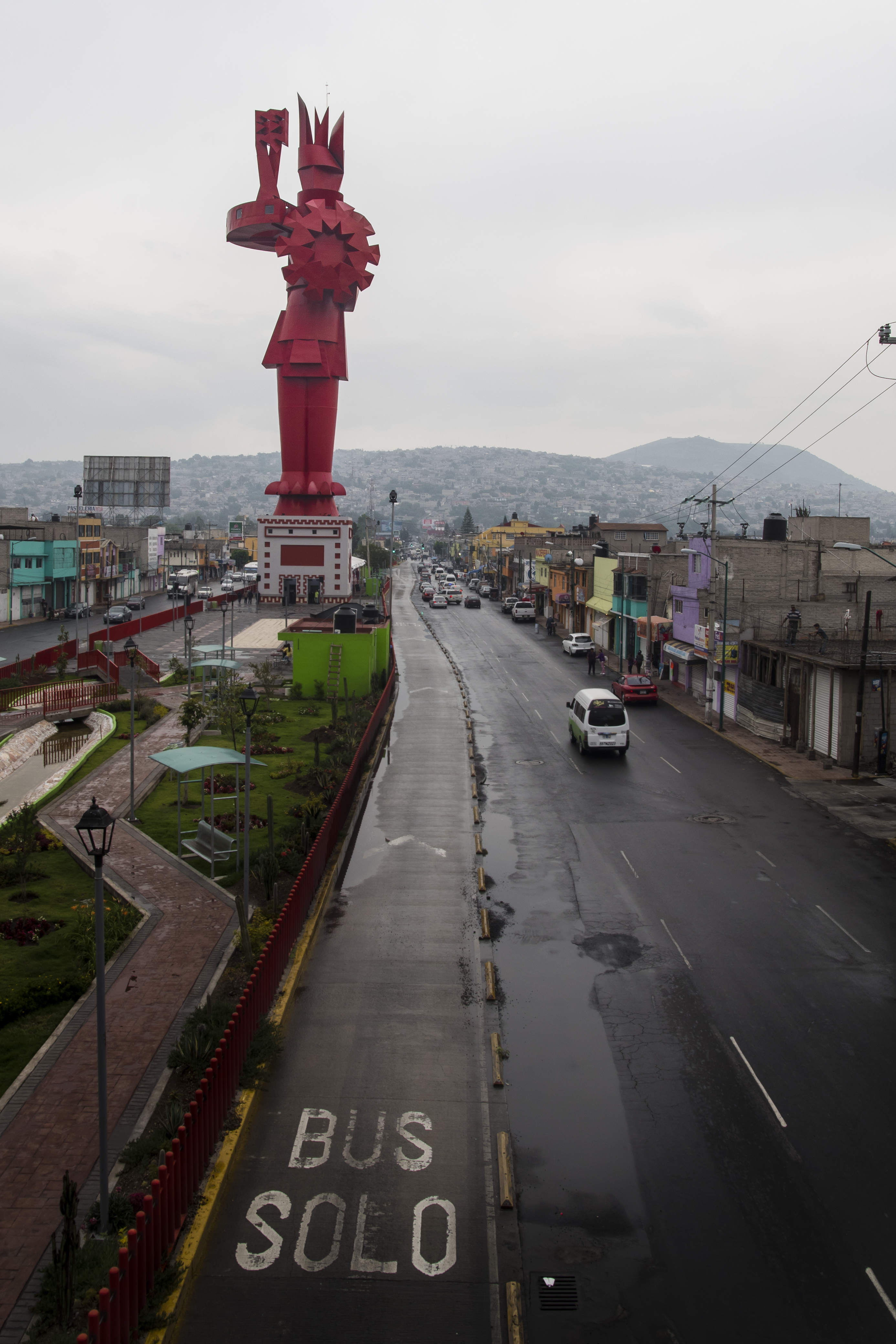 La escultura de "Sebastián" se levanta sobre la avenida principal del municipio de Chimalhuacán, Estado de México.